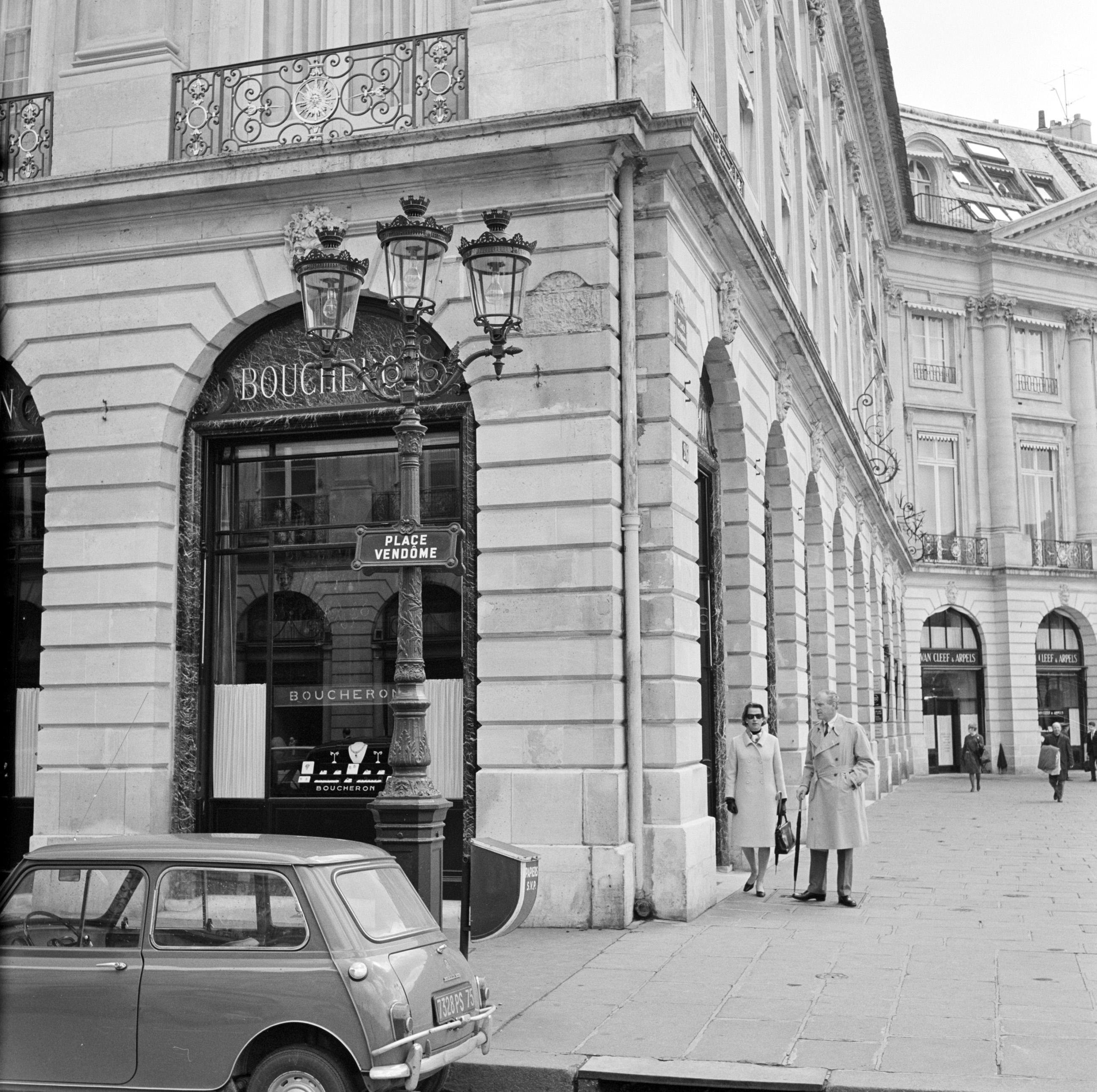 Collectie / Archief : Fotocollectie Van de Poll Reportage / Serie : Pariser Bilder [Het straatleven van Parijs] Beschrijving : Juwelier Boucheron aan de Place Vendôme Datum : 1965 Locatie : Frankrijk, Parijs Trefwoorden : auto's, etalages, juweliers, straatbeelden, winkels Fotograaf : Poll, Willem van de Auteursrechthebbende : Nationaal Archief Materiaalsoort : Negatief (6x6) Nummer archiefinventaris : bekijk toegang 2.24.14.02 Bestanddeelnummer : 254-0325